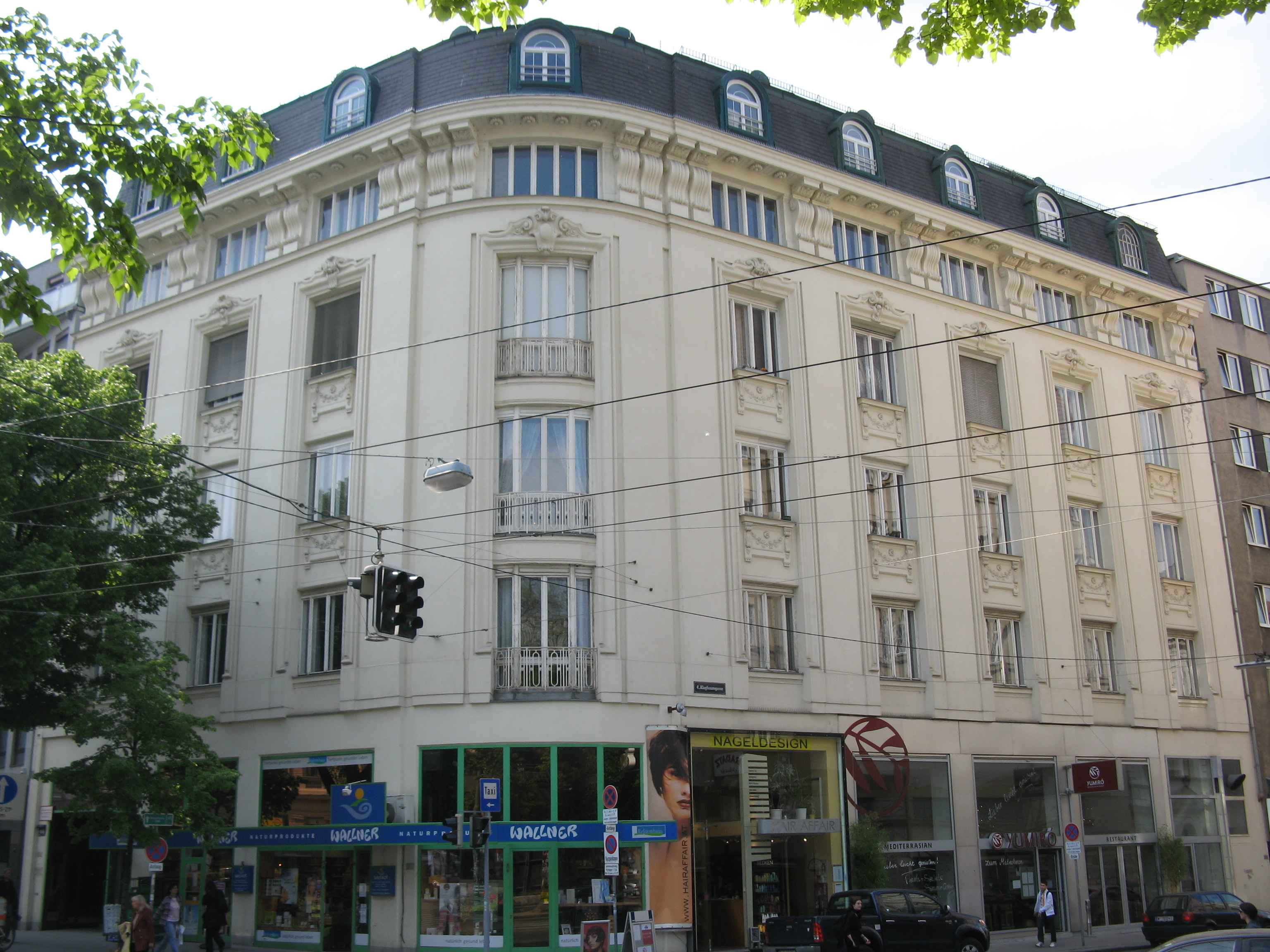 Haus (1914) von Adolf Jelletz, Wiedner Hauptstraße 66, Wien-Wieden